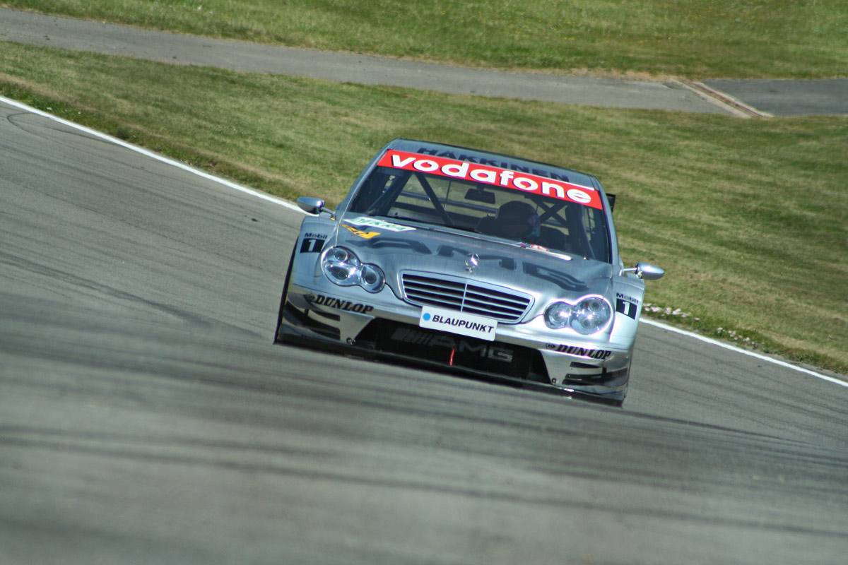 Mika Häkkinen driving for Mercedes-Benz in the 2006 Deutsche Tourenwagen Masters season.